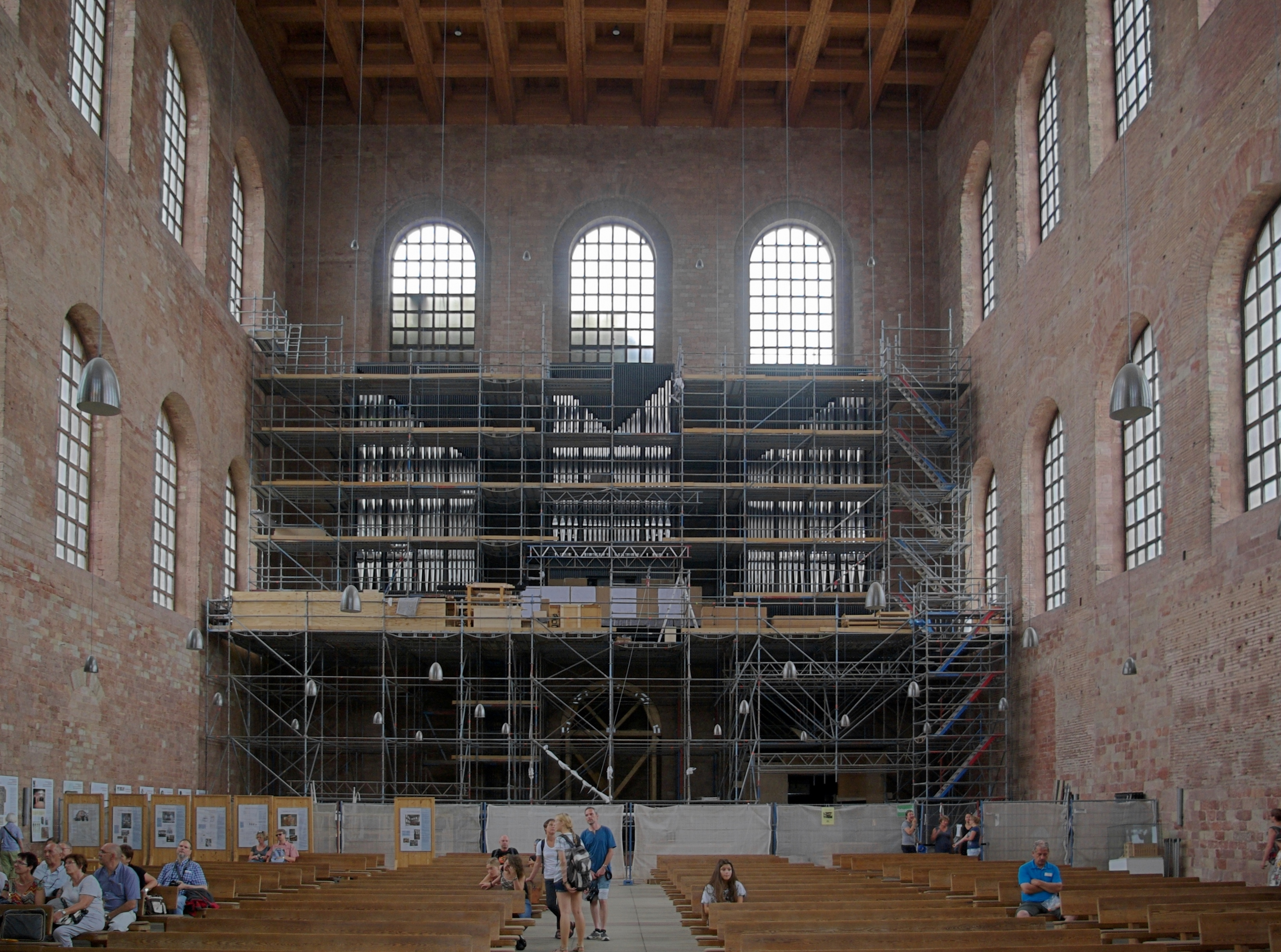 Trier, Konstantinbasilika, Einbau der neuen Orgel